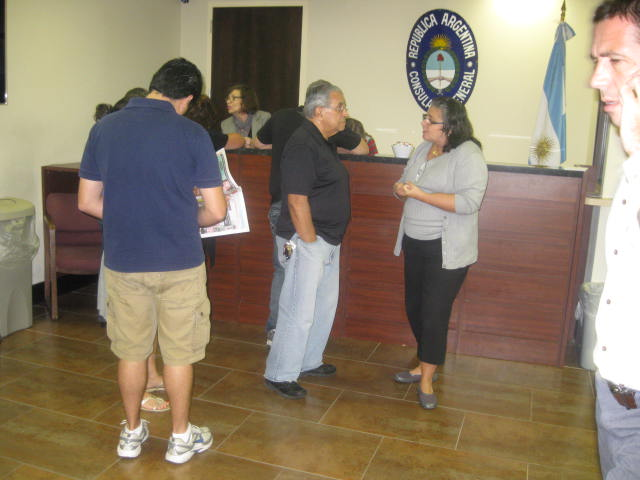 Sala de espera del Consulado Argentino en Miami, localizado en 1101 Brickell Avenue, Piso 9, en la cual los funcionarios del consulado reciben e informan a los ciudadanos que se acrecan a votar